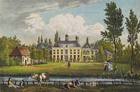 Kasteel de Ulenpas bij Hoog-Keppel Original caption: "Chateau d'Ulenpas, Provence de Gueldre."